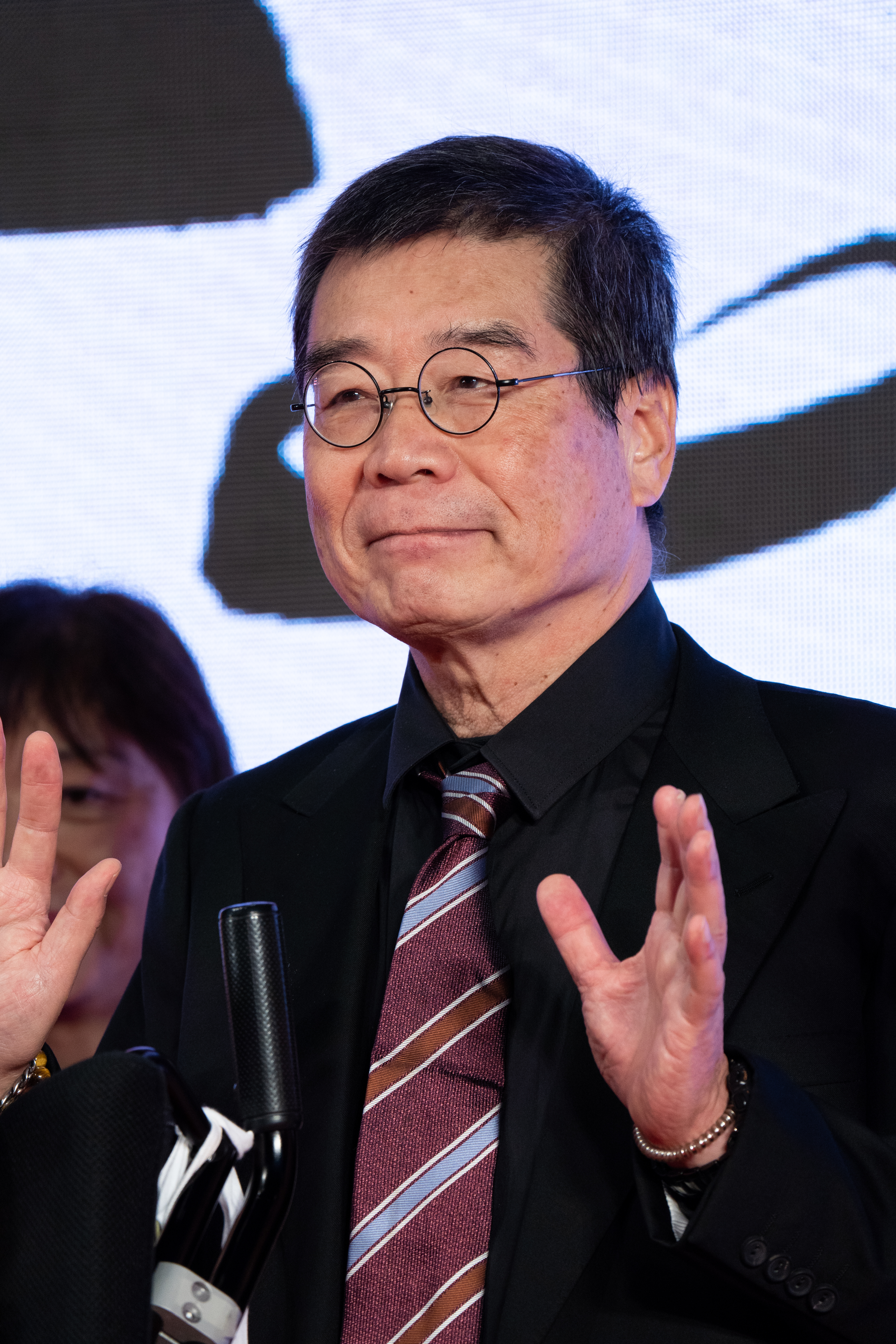 第32回 東京国際映画祭 オープニングセレモニー 原一男 (れいわ一揆)